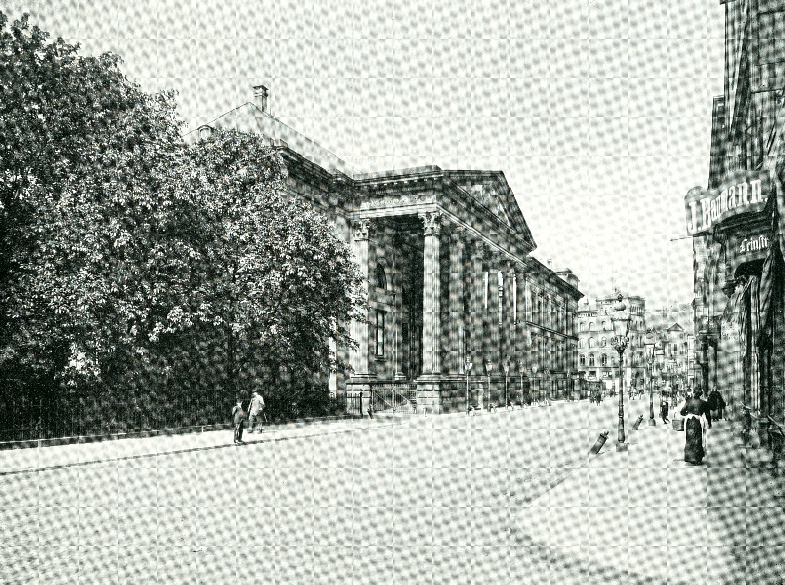 „Hannover – 26 Ansichten nach künstlerischen Aufnahmen“ von Karl F. Wunder. – Residenzschloss.